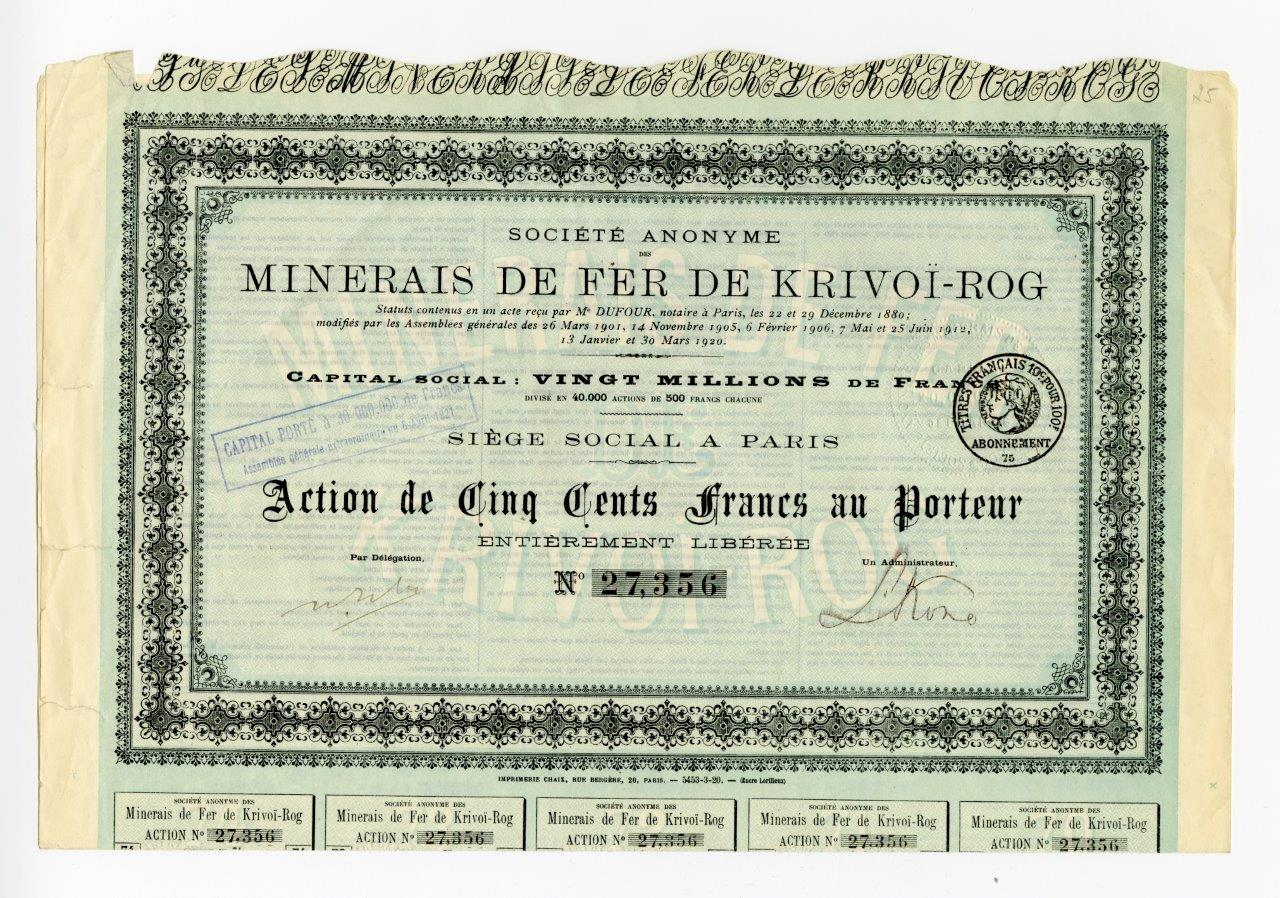 Акция в 500 французских франков на предъявителя Анонимного общества Криворожских железных руд с основным капиталом в 8 млн. фр. Париж, 1921 г.